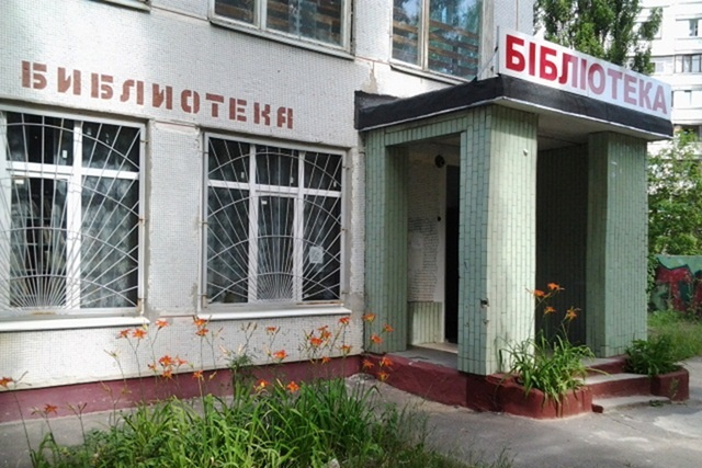 Бібліотека-філія № 50 м.Харкова